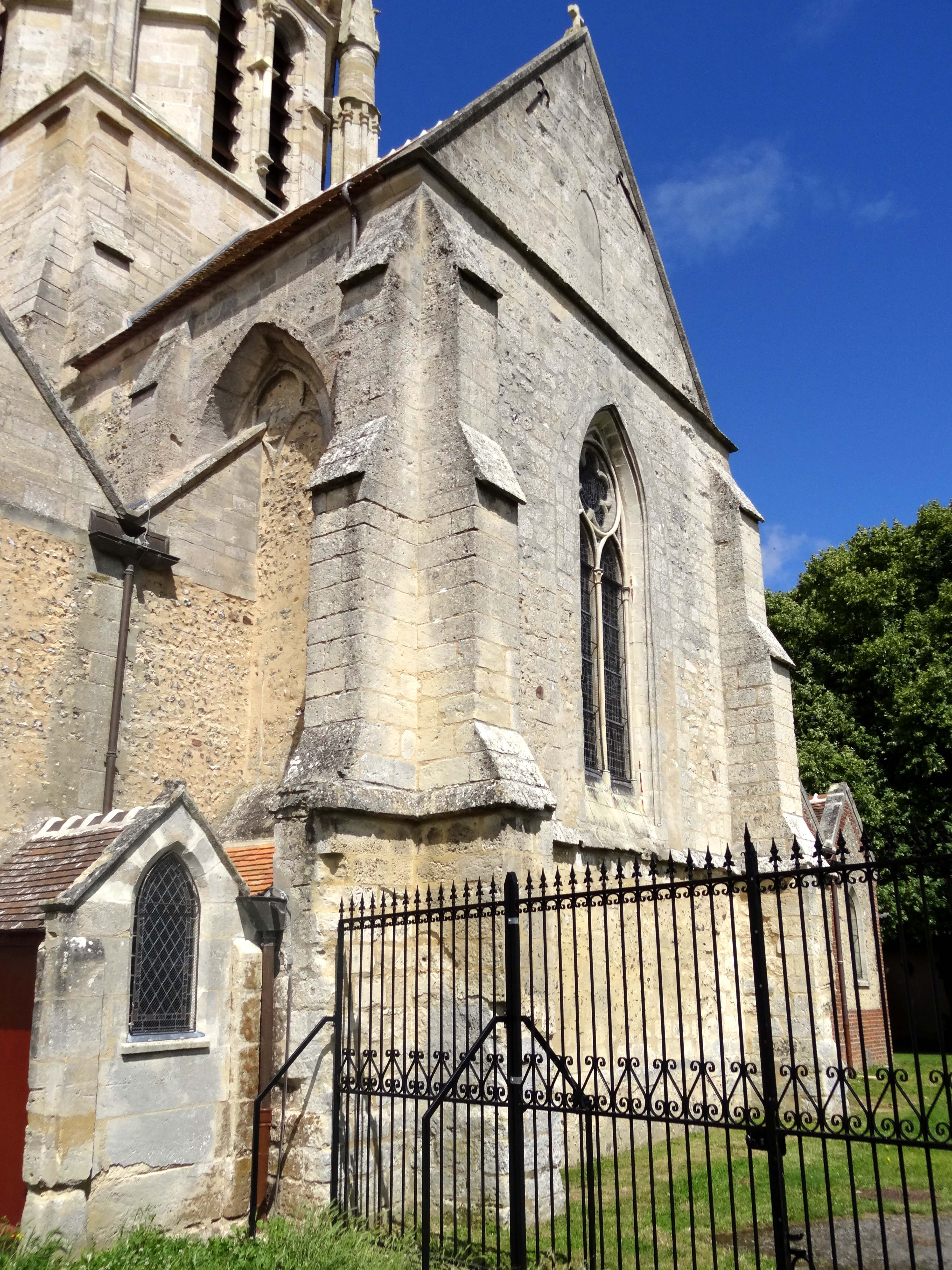 Église Saint-Crépin-et-Saint-Crépinien de Saint-Crépin-Ibouvillers - voir titre.